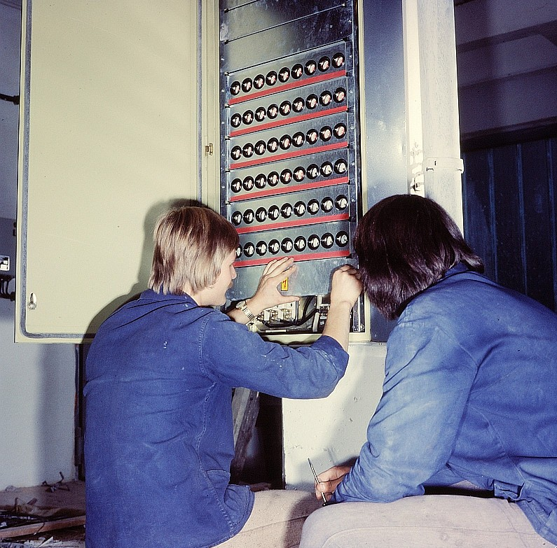 Original image description from the Deutsche FotothekElektromonteur, Brauerei